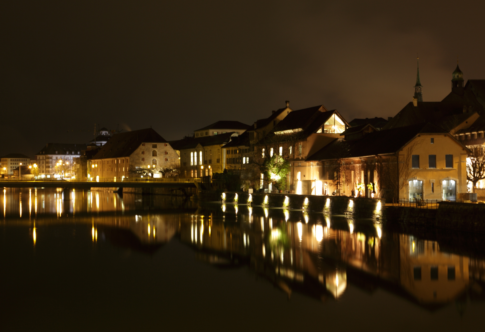 Im Januar werden Uferbau und Landhaus mit dem typisch gelben Licht der Filmtage beleuchtet.